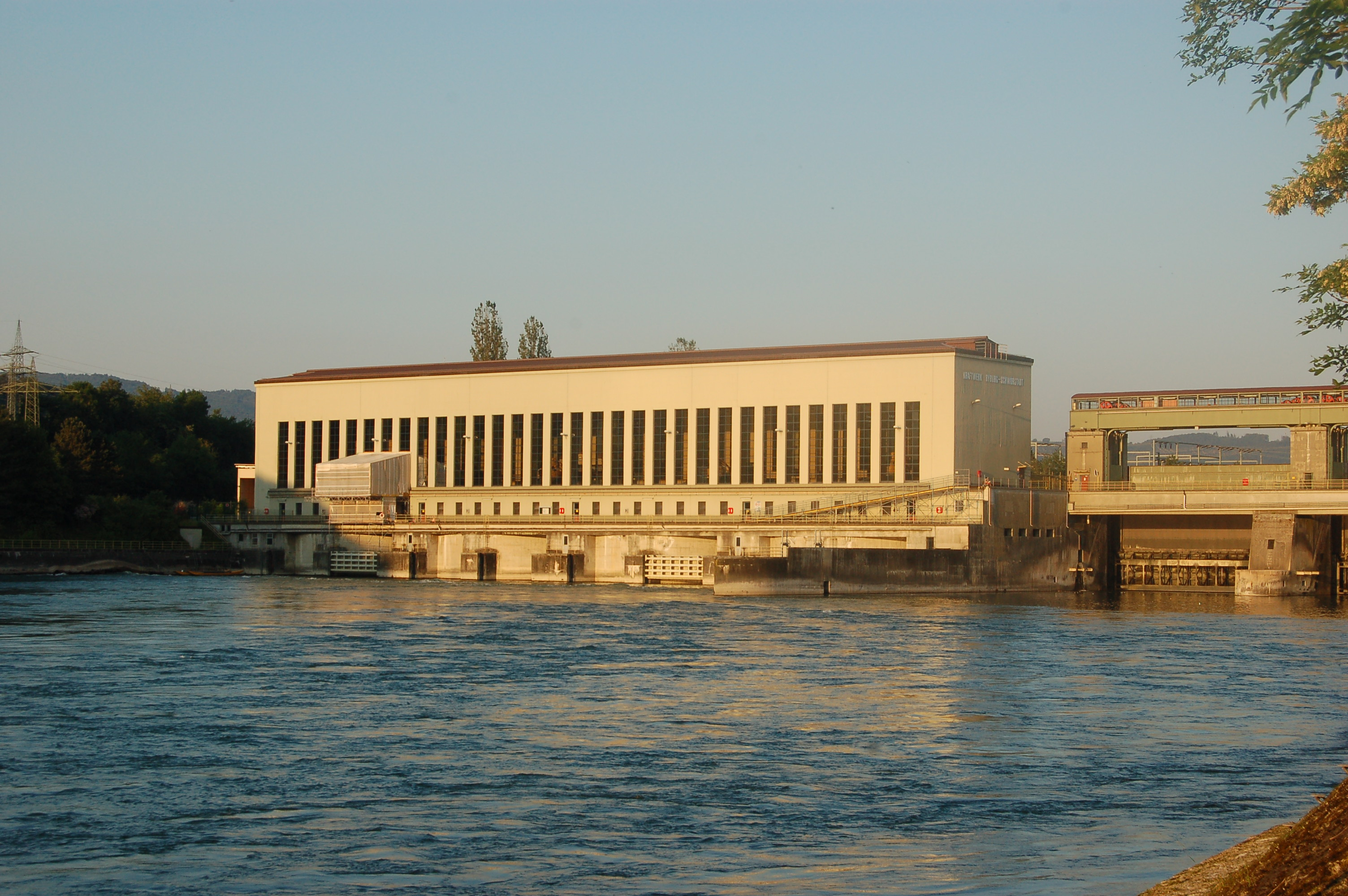 Kraftwerk Ryburg-Schwörstadt